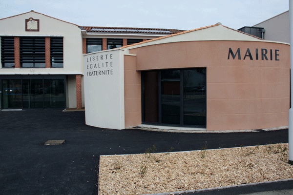 La nouvelle mairie de Saint-Aignan de Grand Lieu a ouverte le 14 janvier 2013, place Millénia